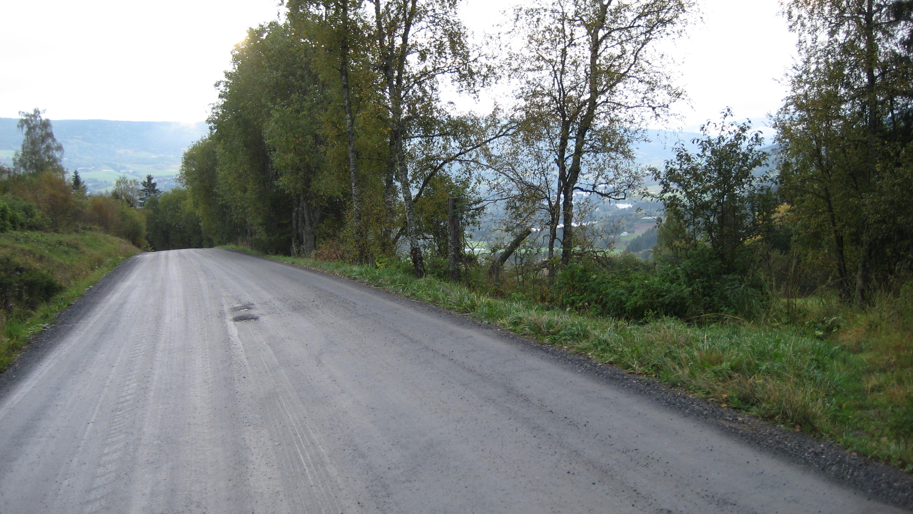 Fylkesveg 2512 (tidl. 294), Vestre Slidre